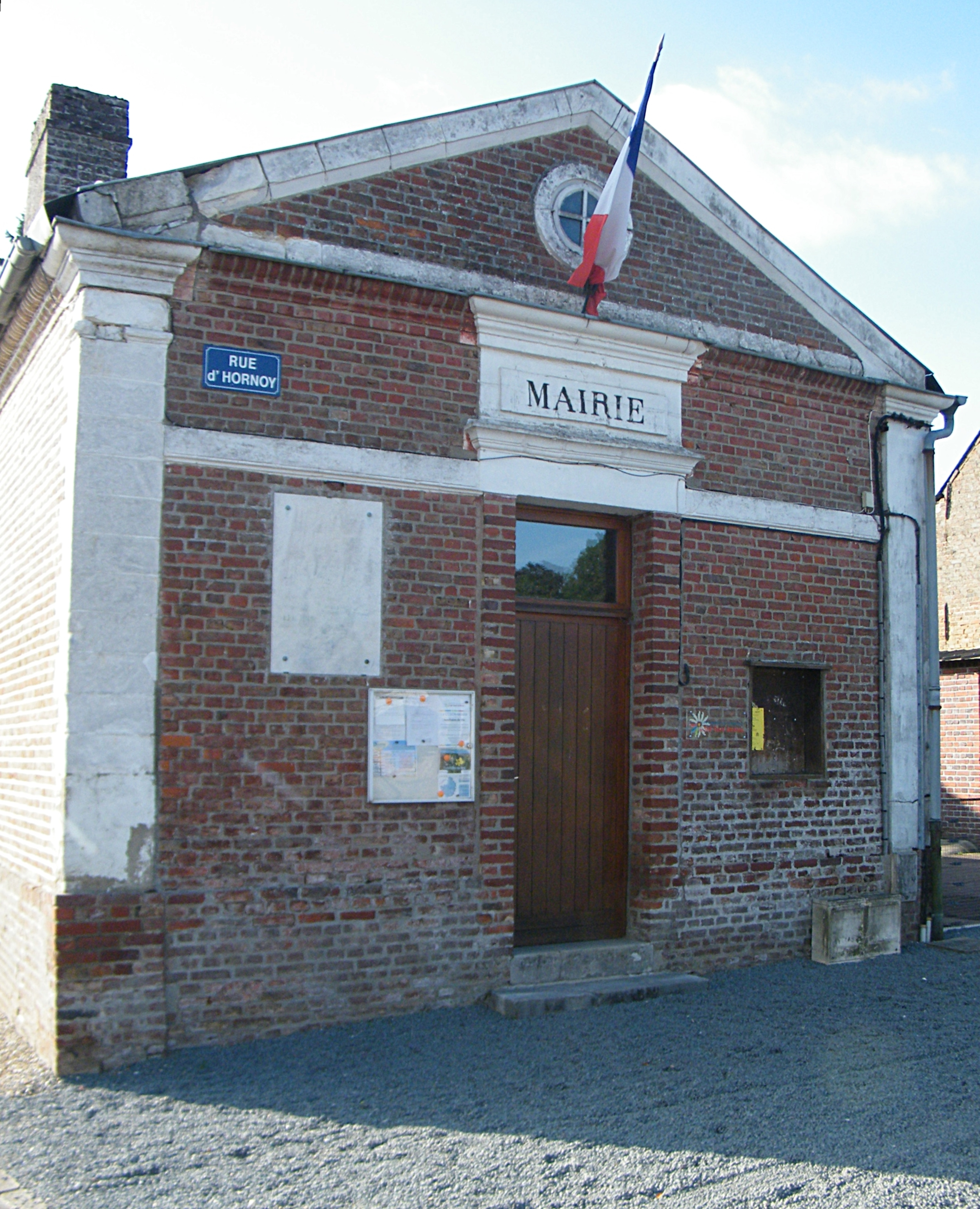 Mairie.